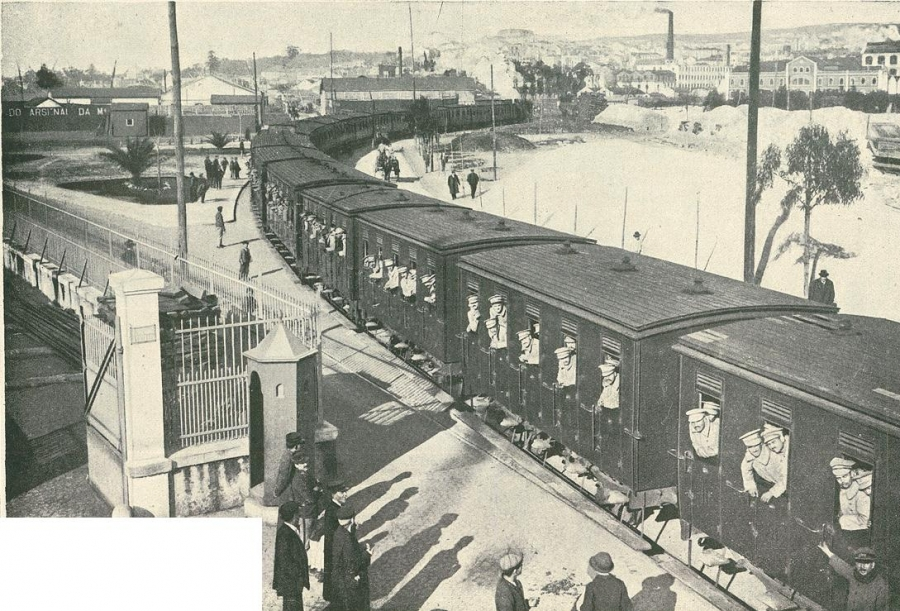 Chegada ao cais de Alcântara de um transporte de tropas. Joshua Benoliel, Ilustração Portuguesa, série II, nº. 577, Lisboa, 12 de Março de 1917, p. 214.